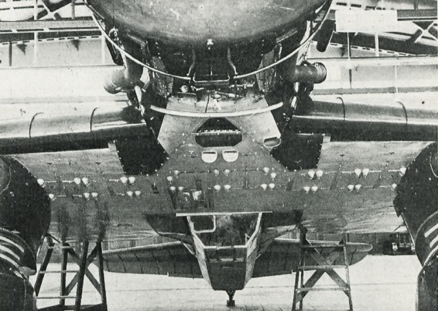 Dół kadłuba PZL.23 Karaś